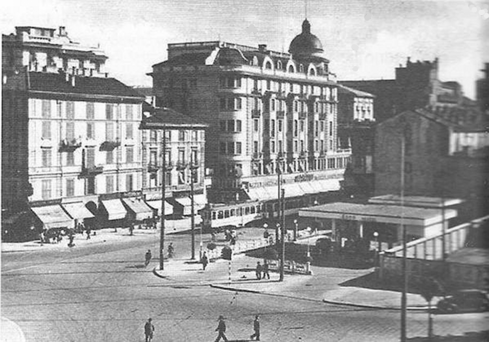 Angolo tra Piazzale Loreto e corso Buenos Aires - Mialno _anni '40